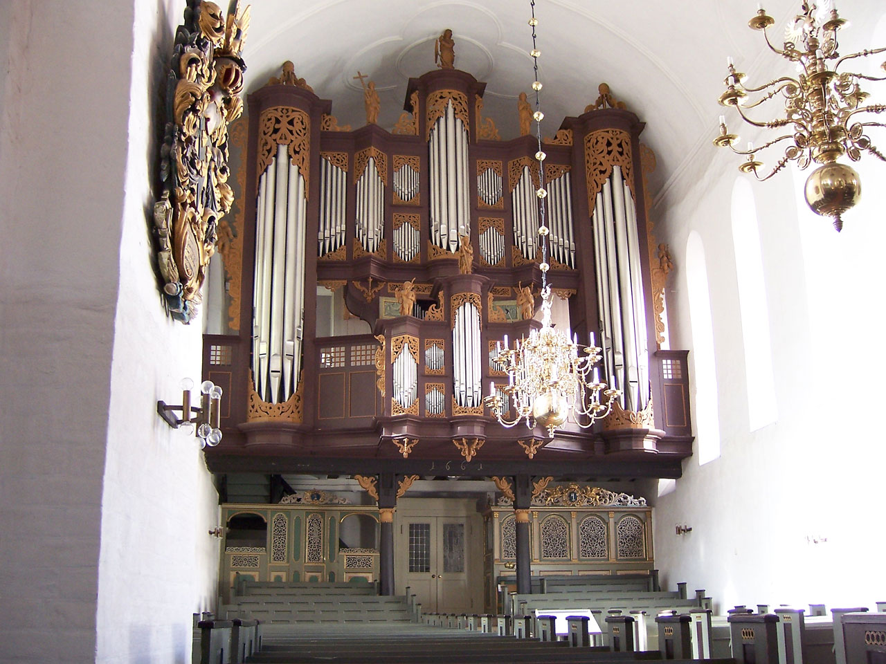 Stade, Kirche St. Cosmae (13.Jh), Orgel von Meister Berend Hueß und seinem Gesellen Arp Schnitger 1668-73, später von Arp Schnitger umgebaut